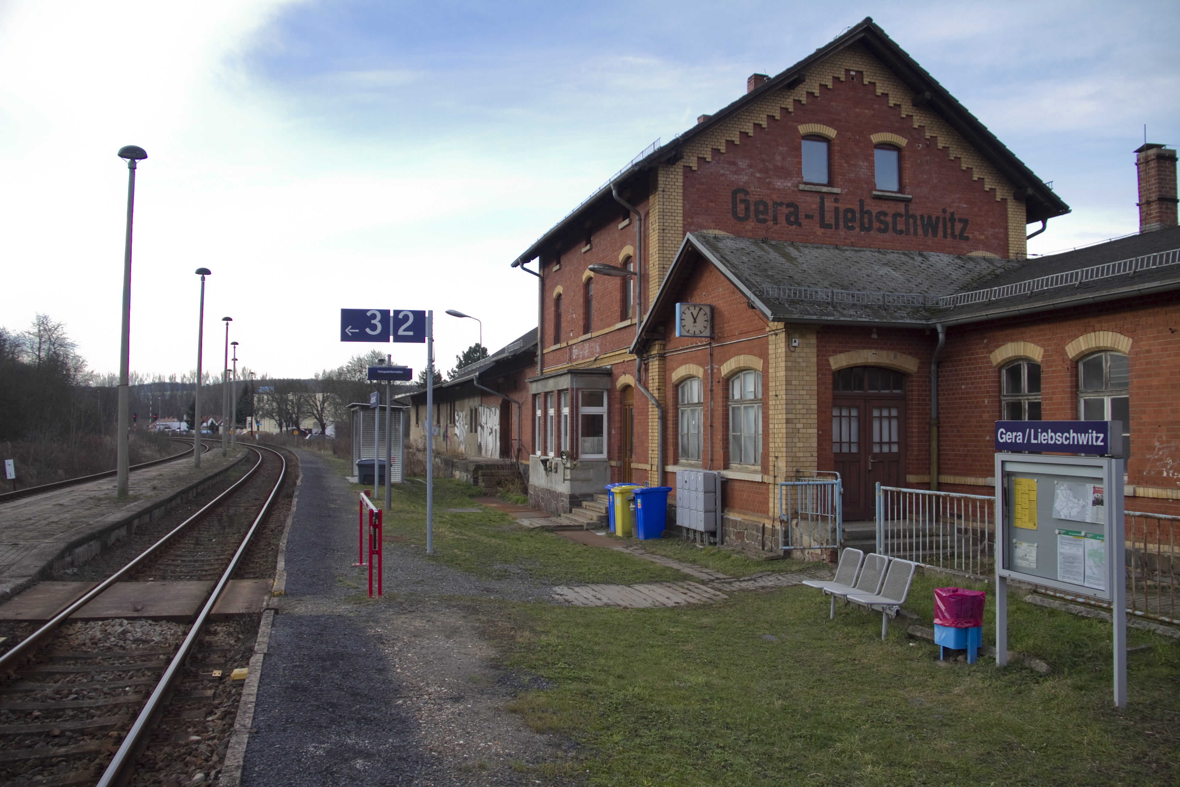 Bahnhof Gera Liebschwitz (Bahnhofsseite)